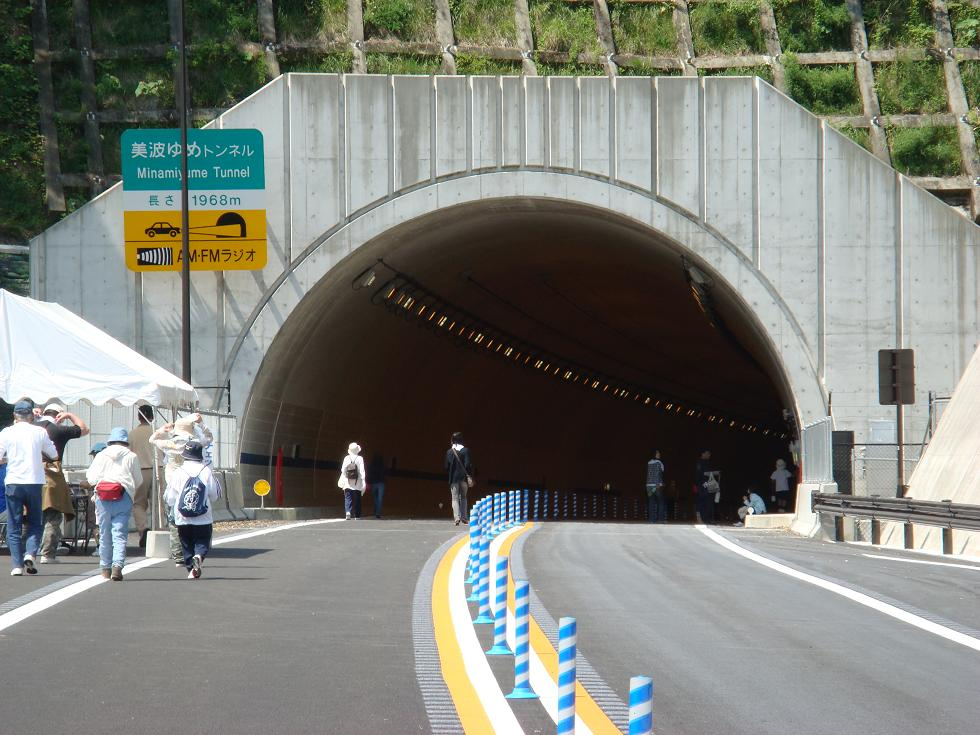 日和佐道路美波ゆめトンネル（徳島県海部郡美波町） 開通イベント時